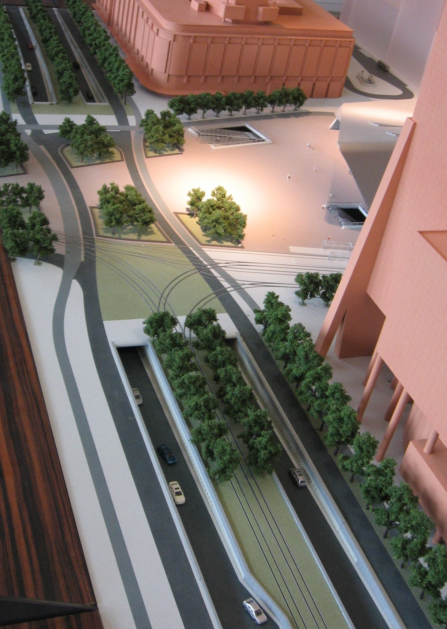 weenatunnel